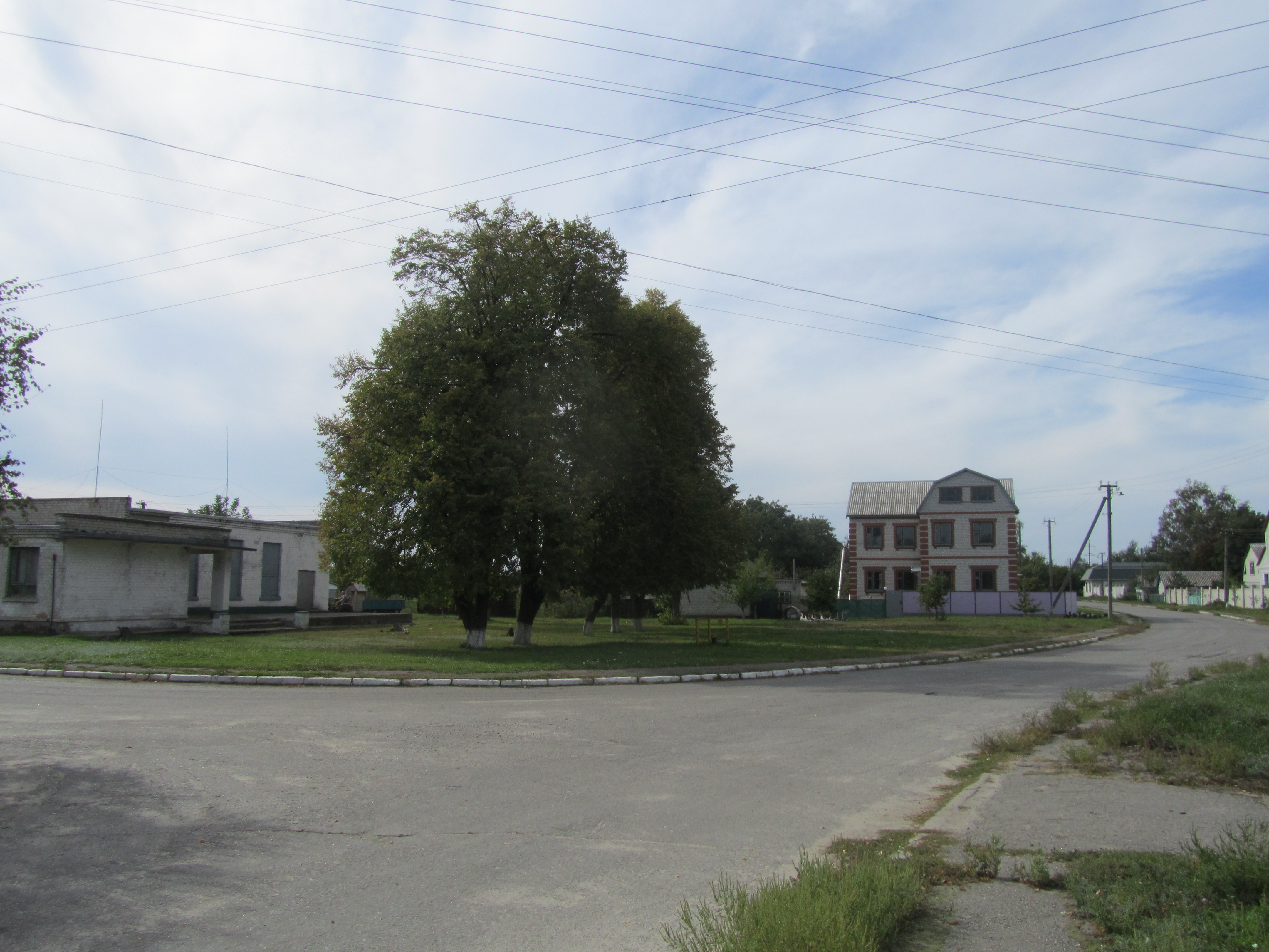 Село Придніпрянське Кременчуцького району